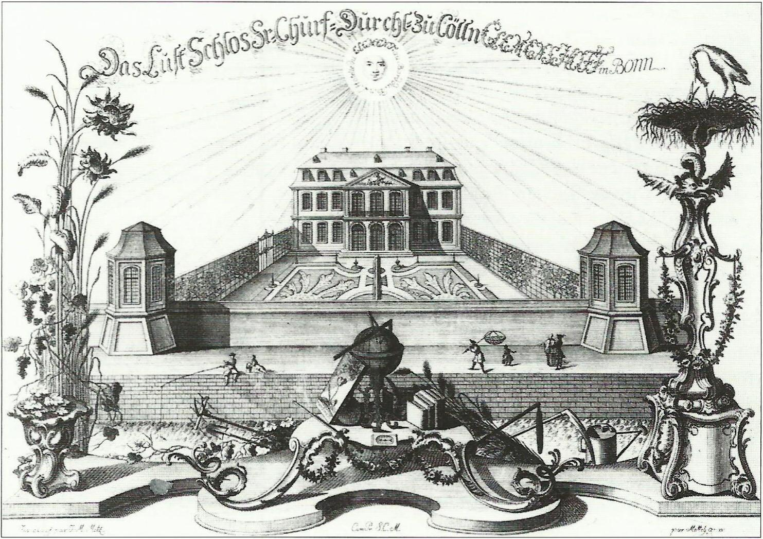 Clemenshof (später Boeselager Hof; kriegszerstört), Bonn: Kupferstich von Nikolaus Mettely nach Johann Martin MetzDas Lustschloss seiner churfürstlichen Durchlaucht zu Cölln Clemenshoff in Bonn